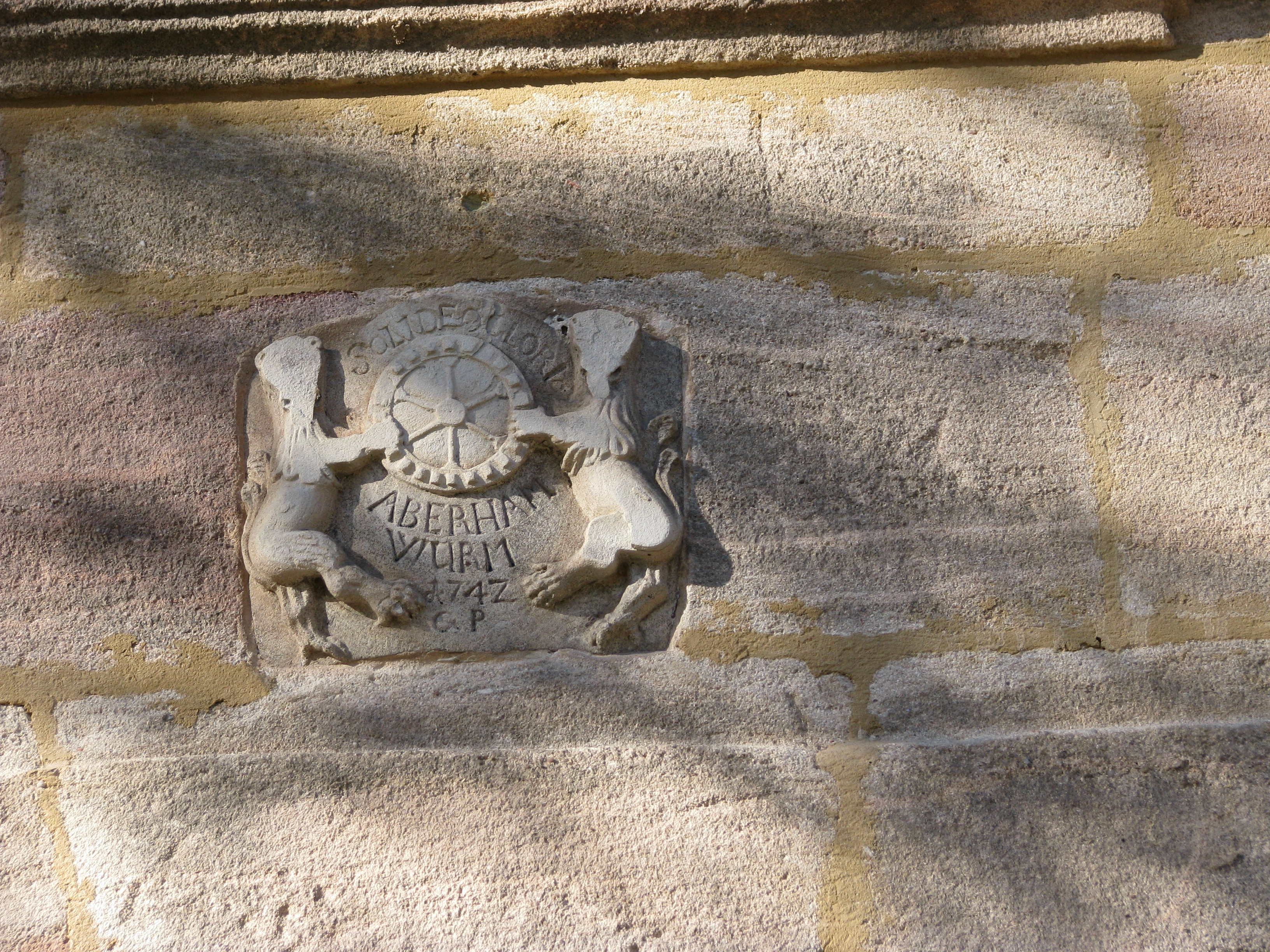 Fuchsmühle, Ortsteil von Hilpoltstein im mittelfränkischen Landkreis Roth